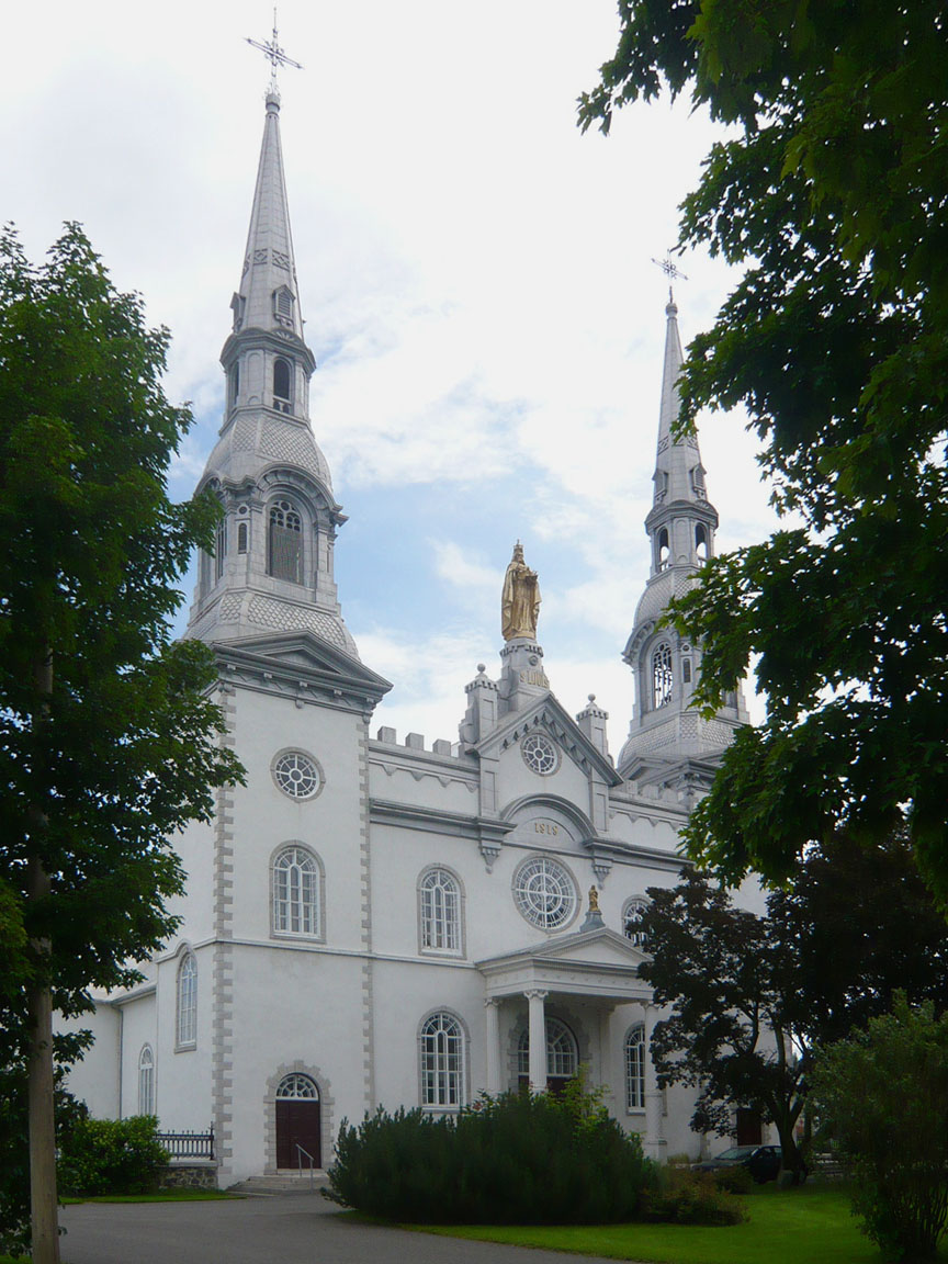 Église Saint-Louis, Lotbinière. Province de Québec. Canada. Classée monument historique en 1965